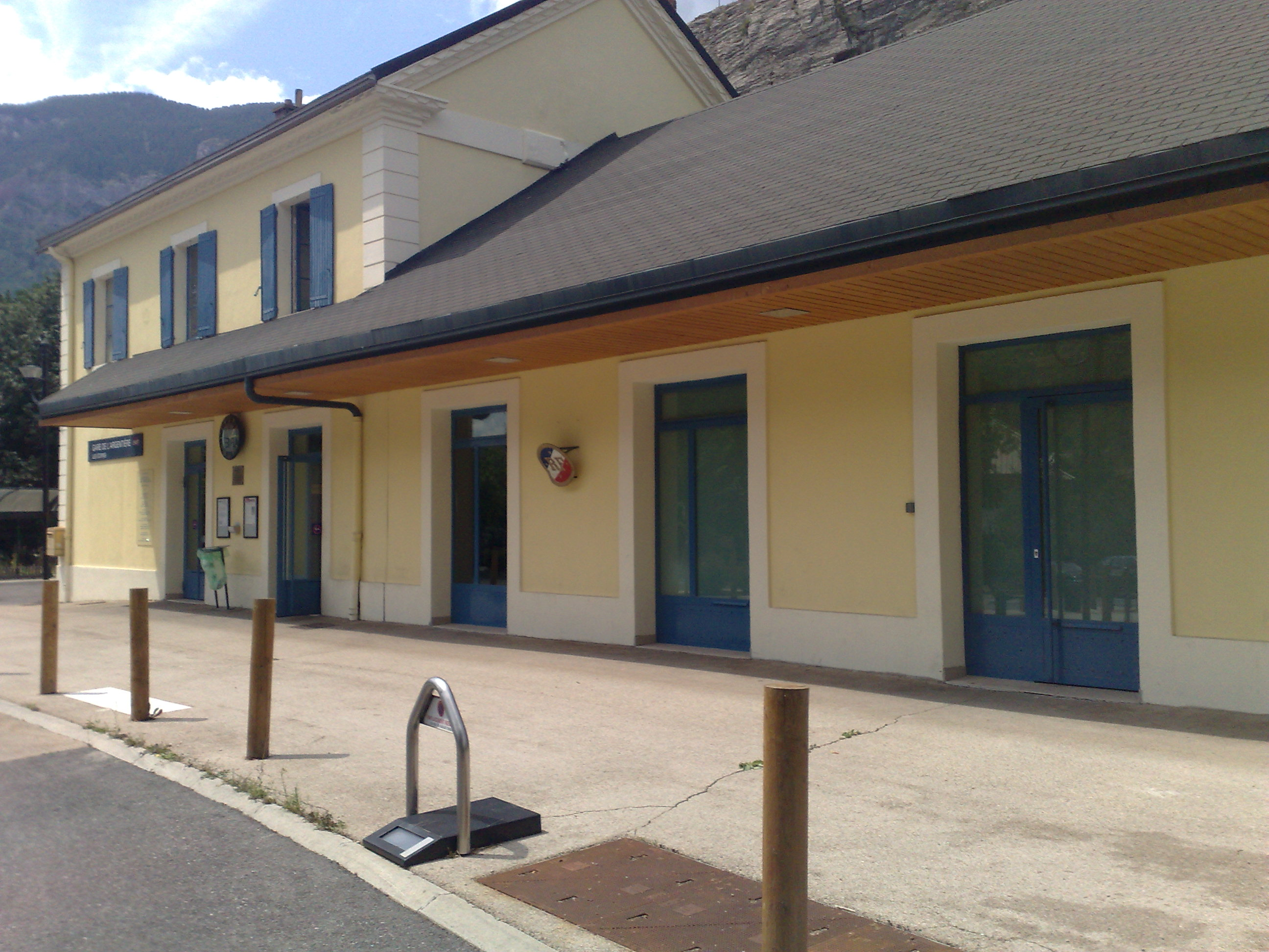 Façade de la gare de L'Argentière-les Écrins.